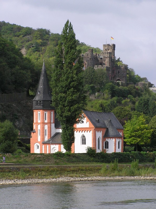 Beschreibung: Klemenskappele und Burg Reichenstein bei Trechtingshausen Quelle: fotografiert im Oktober 2005 Fotograf: Oswald Engelhardt